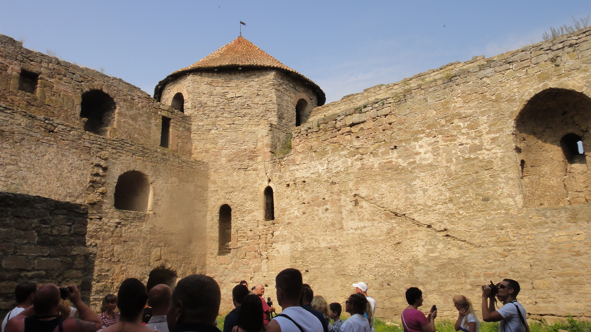 Белгород-Днестровская (Аккерманская) крепость, Украина. Внутренний двор Цитадели, вид на Придворную Башню. Тут раньше находились покои коменданта крепости (сохранилось место алтаря - ниша в стене справа, и места крепления лестниц). Нижний проем в стене башни - тайный ход, ведущий на берег (сейчас - затоплен).